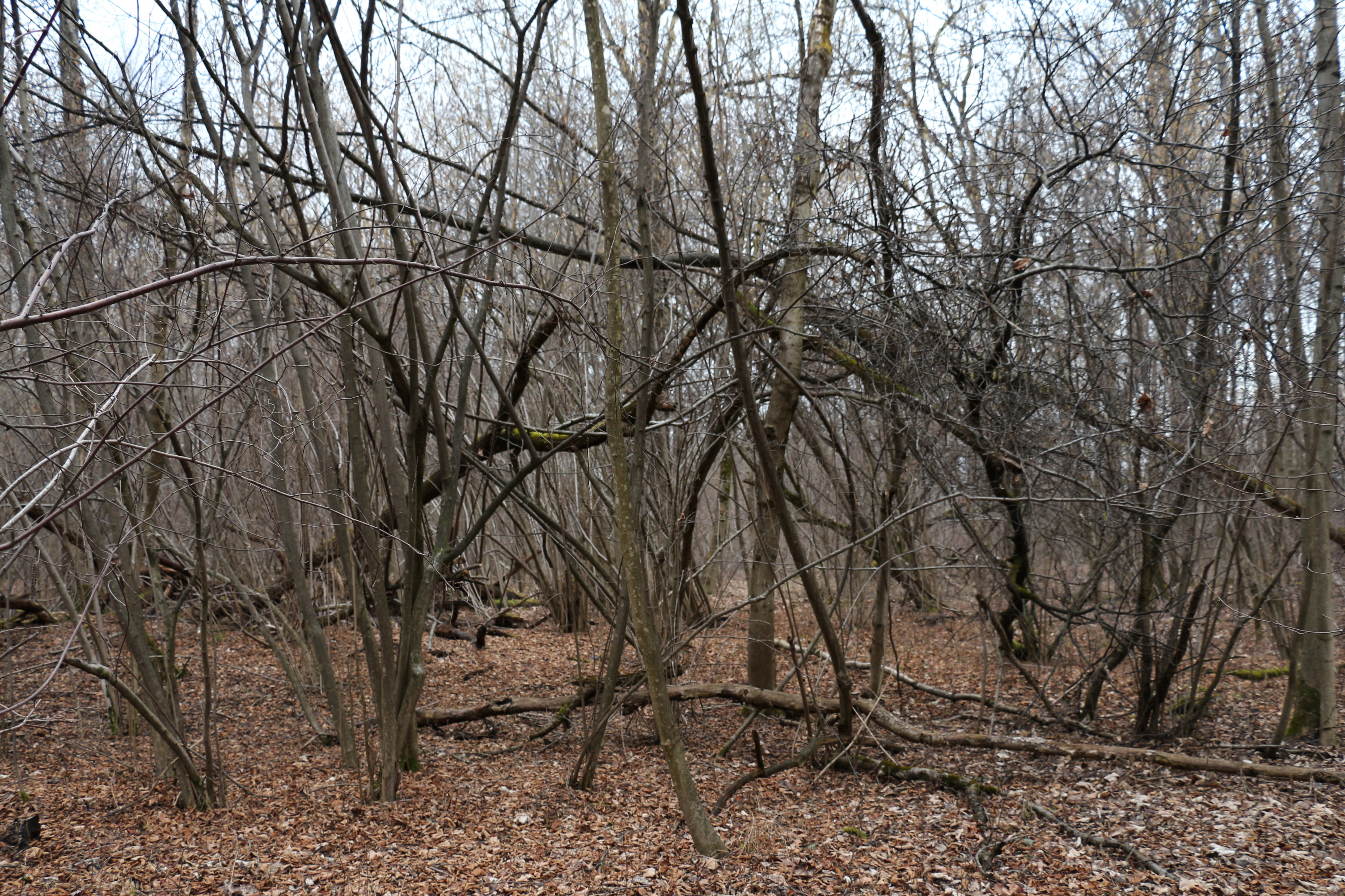 In der Itzlinger Au im Februar; Salzburg, Stadtteil Liefering. This media shows the Geschützter Landschaftsteil in Salzburg with the ID GLT00108.